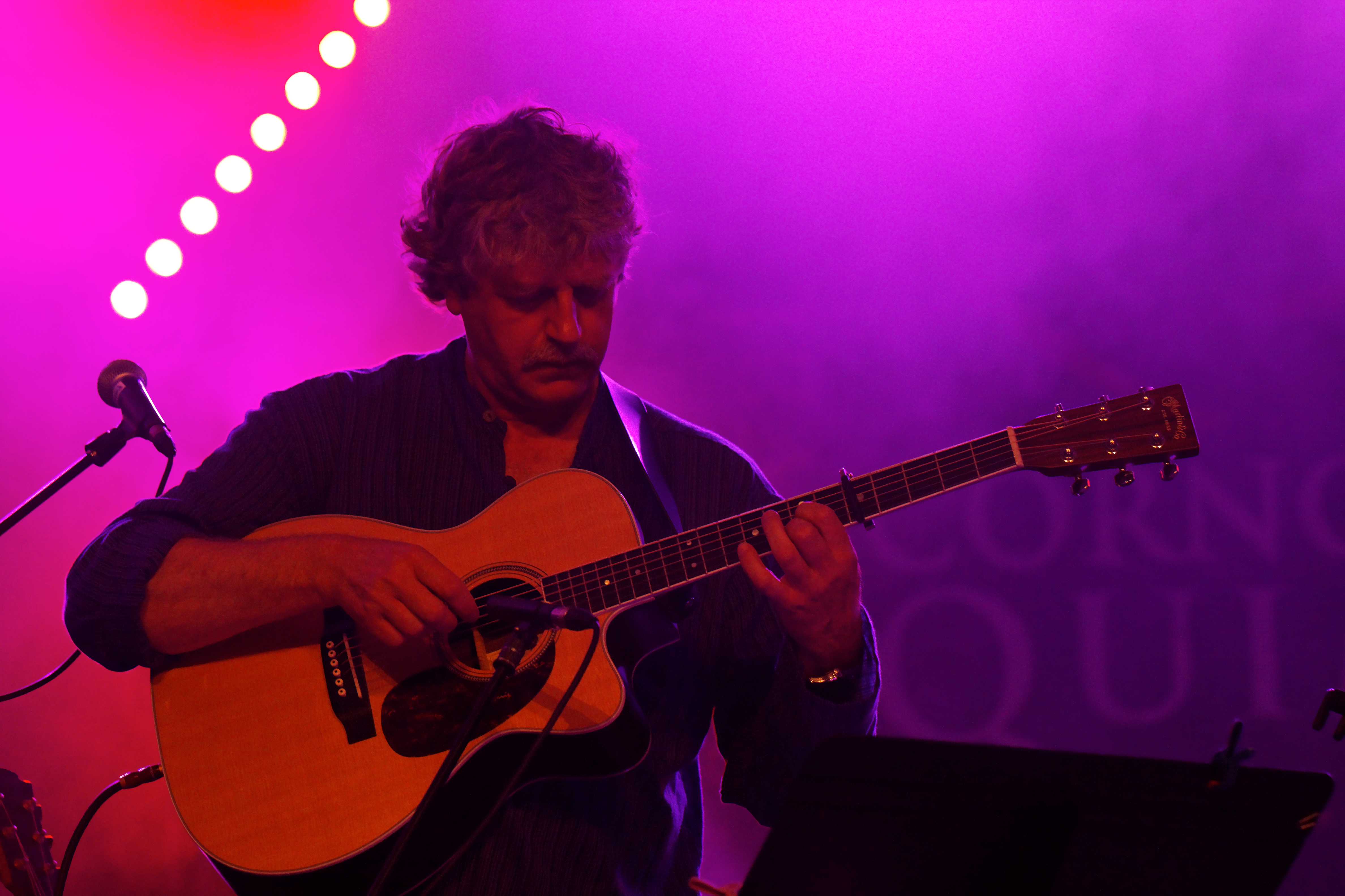 Gilles le Bigot Group en concert le 19 juillet lors du festival de Cornouaille 2011.